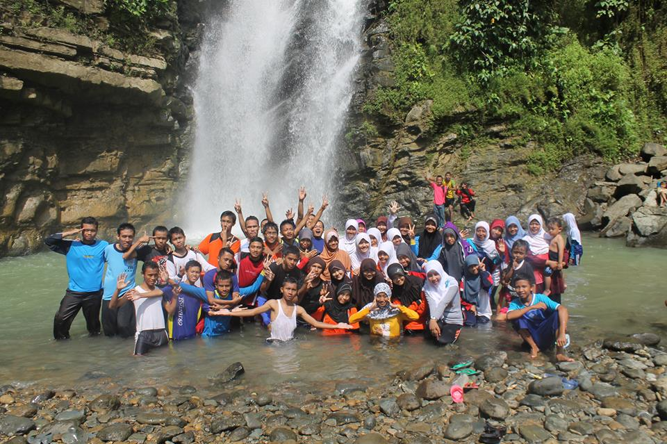 Karang Pucung Pariwisata